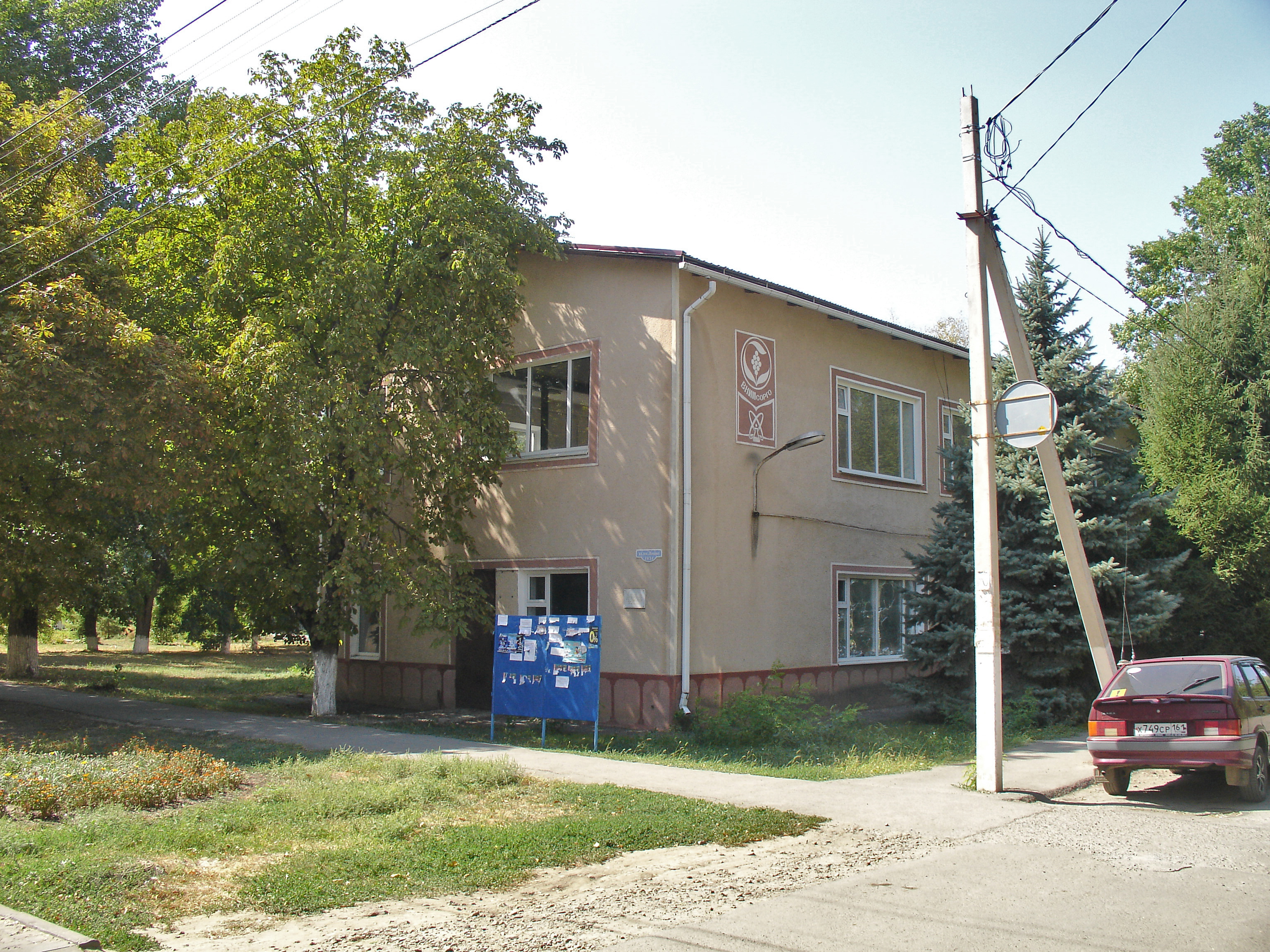 ВНИИ Сорго, г. Зерноград, Ростовская обл., Россия